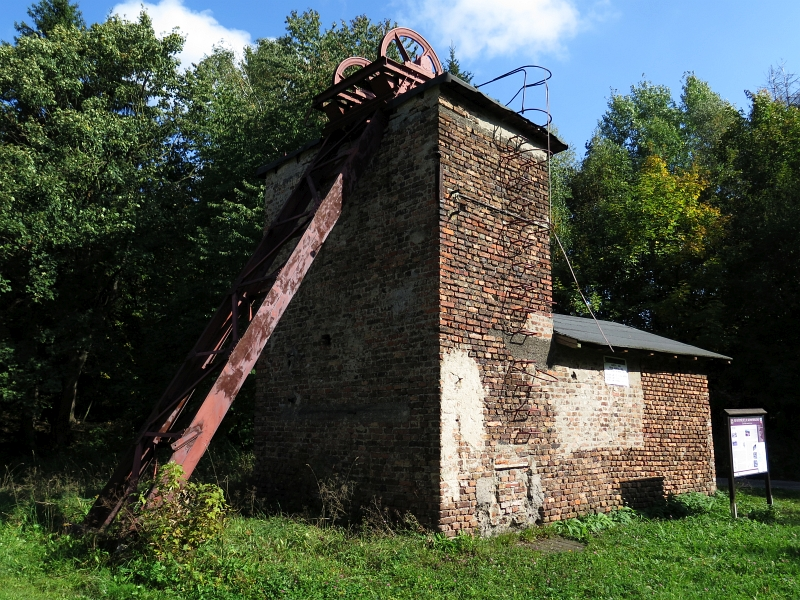 Důl Jiří, Na Jiřím kopci, st. 239, Žacléř.